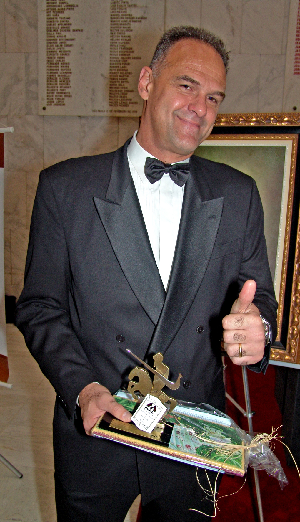 O ex-jogador de basqueste e dirigente esportivo brasileiro Oscar Schmidt.TroféuSet2006 (17)